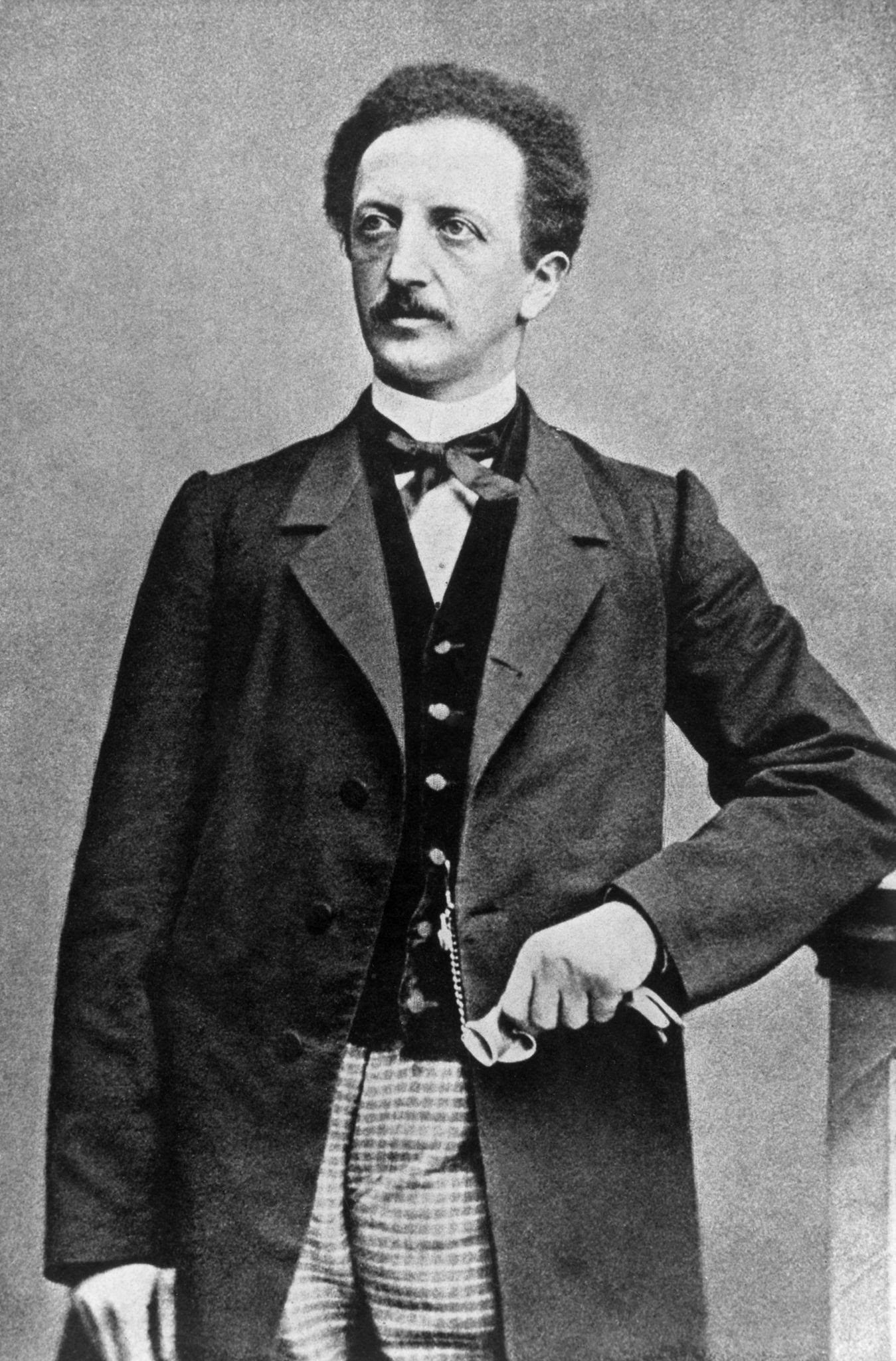 Factual corrections and alternative descriptions are encouraged separately from the original description. Additionally errors can be reported at this page to inform the Bundesarchiv. Original historic description: Ferdinand Lassalle Zentralbild Ferdinand Lassalle, Schriftsteller, Politiker, Begründer des Allgemeinen Deutschen Arbeitervereins. Er war zeitlebens Vertreter des philosophischen Idealismus Hegelscher Prägung. geb: 11.4.1825 in Breslau, gest: 31.8.1864 in Genf Aufnahme: 1860 Abgebildete Personen: Lassalle, Ferdinand: Gründer des Allgemeinen Deutschen Arbeitervereins, Deutschland